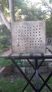 Hôtel d'abeilles sauvages artisanal dans un tronc d'arbre. Trous : diamètre 8 profondeur 5 à 10 cm